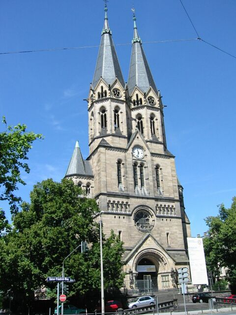 Bild der Ringkirche Wiesbaden